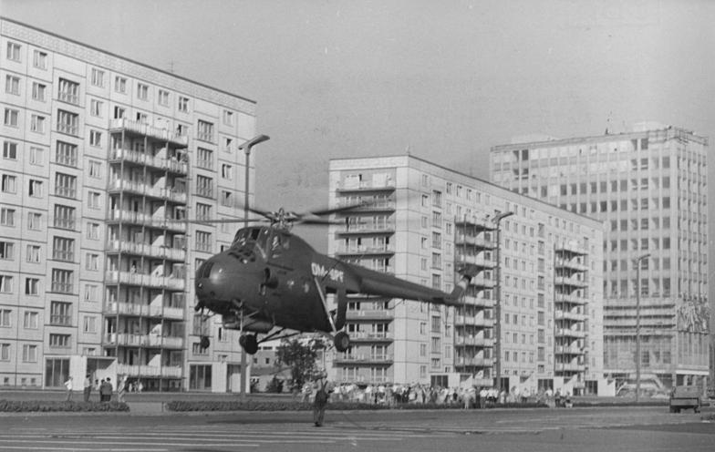 Zentralbild Spremberg 19.7.1964 Berlin: Hubschrauber unterstützte Montagearbeiten Hunderten von Berlinern bot sich am Morgen das 19.7.1964 ein nicht alltägliches Schauspiel. Ein Hubschrauber der Interflug vom Typ MI-4 landete fünf Minuten nach fünf in der Karl-Marx-Allee vor dem Kino "International". Nach einer kurzen "Lagebesprechung" stieg er wieder auf, um bei der komplizieren Montage eines Fassenlifts am Haus der Lehrer und der Wissenschaftler auf dem Alexanderplatz zu helfen. Gespannt verfolgen jung und alt, wie die einzelnen Teile des Lifts, an einem heruntergelassenen 20 Meter Stahl-Seil befestigt, von dem Hochhaus aufgenommen und auf das Dach in 54 Meter Höhe gehoben wurde. UBz: Der Hubschrauber über der Karl-Marx-Allee.